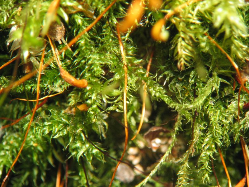 Schlesisches Stumpenmoos (Sharpiella seligeri / Herzogiella seligeri)